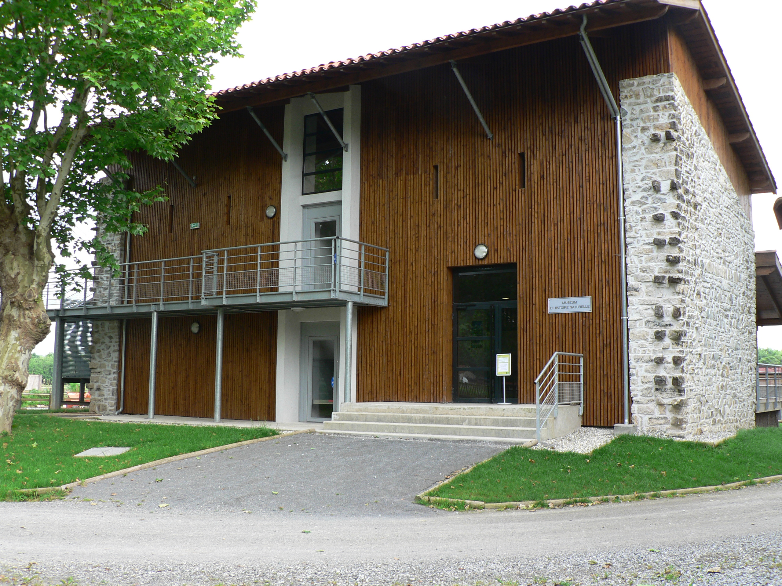 Nouveau bâtiment du Museum d'Histoire Naturelle à la plaine d'Ansot